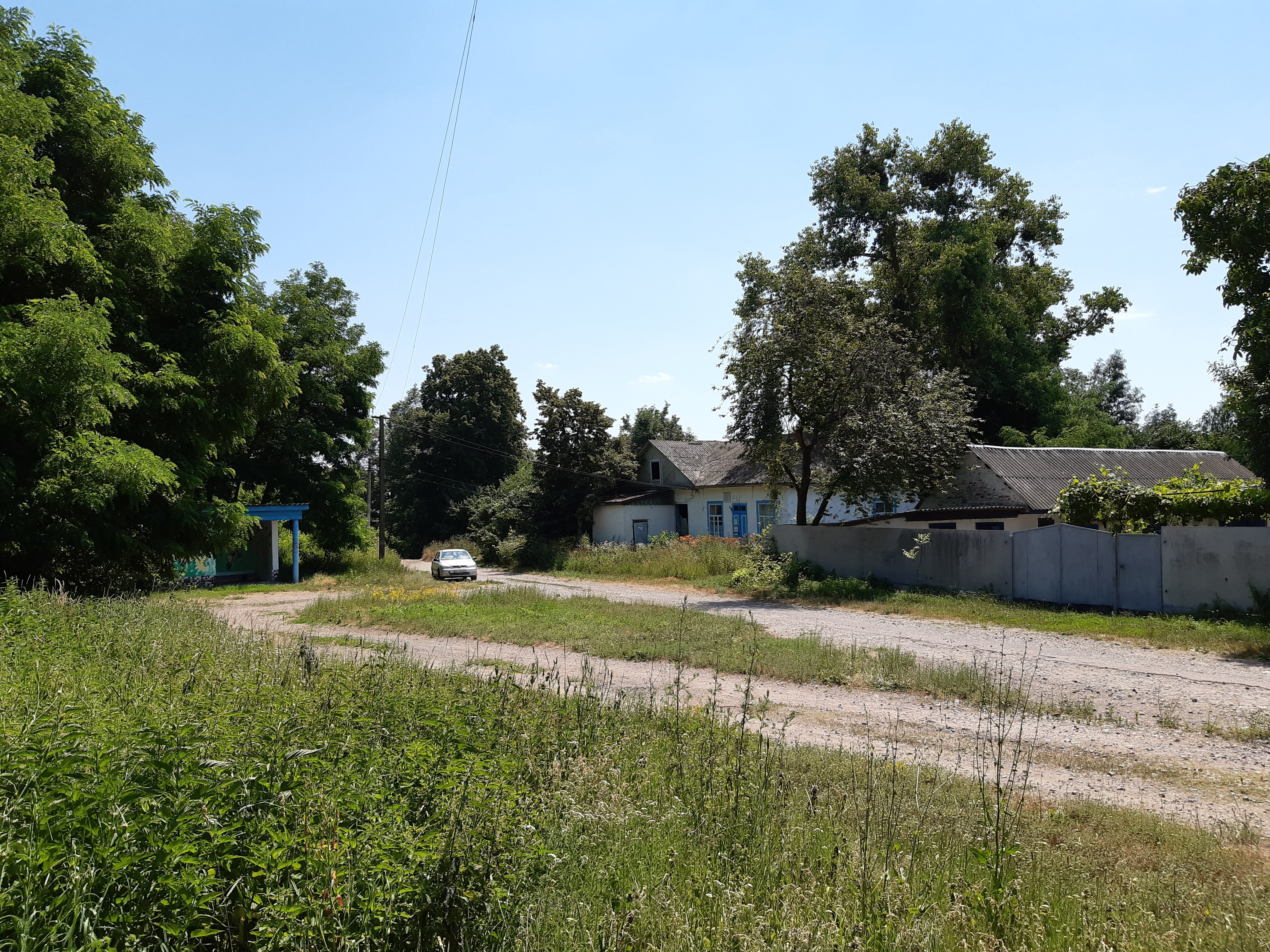 Центр села Маціївки, Прилуцький район, Чернігівська область. Червень 2019